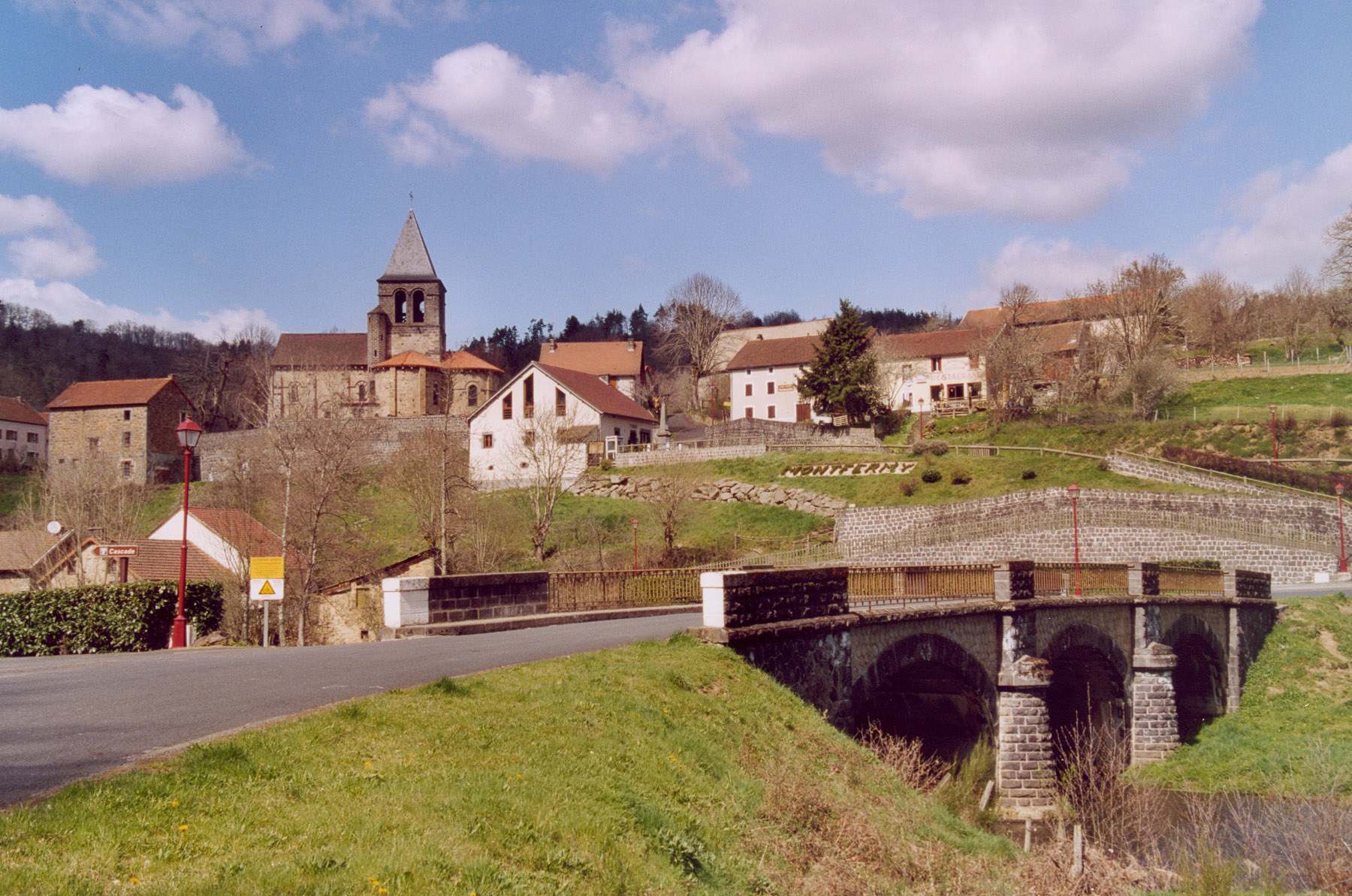 Montfermy Auteur : GIRAUD Patrick